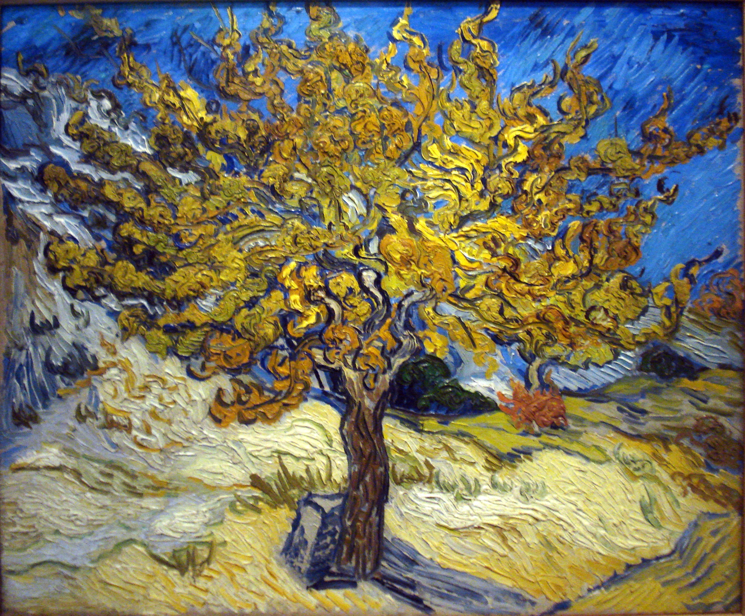 വാൻ ഗോഗ് 1889-ൽ വരച്ച ചിത്രം. പാസഡേനയിലെ നോർട്ടൺ സൈമൺ മ്യൂസിയത്തിൽ നിന്ന്